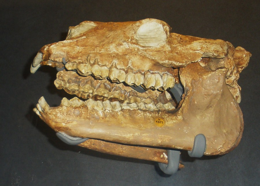 Fossil of Diadiaphorus, an extinct mammal-- Took the photo at Natural History Museum, London